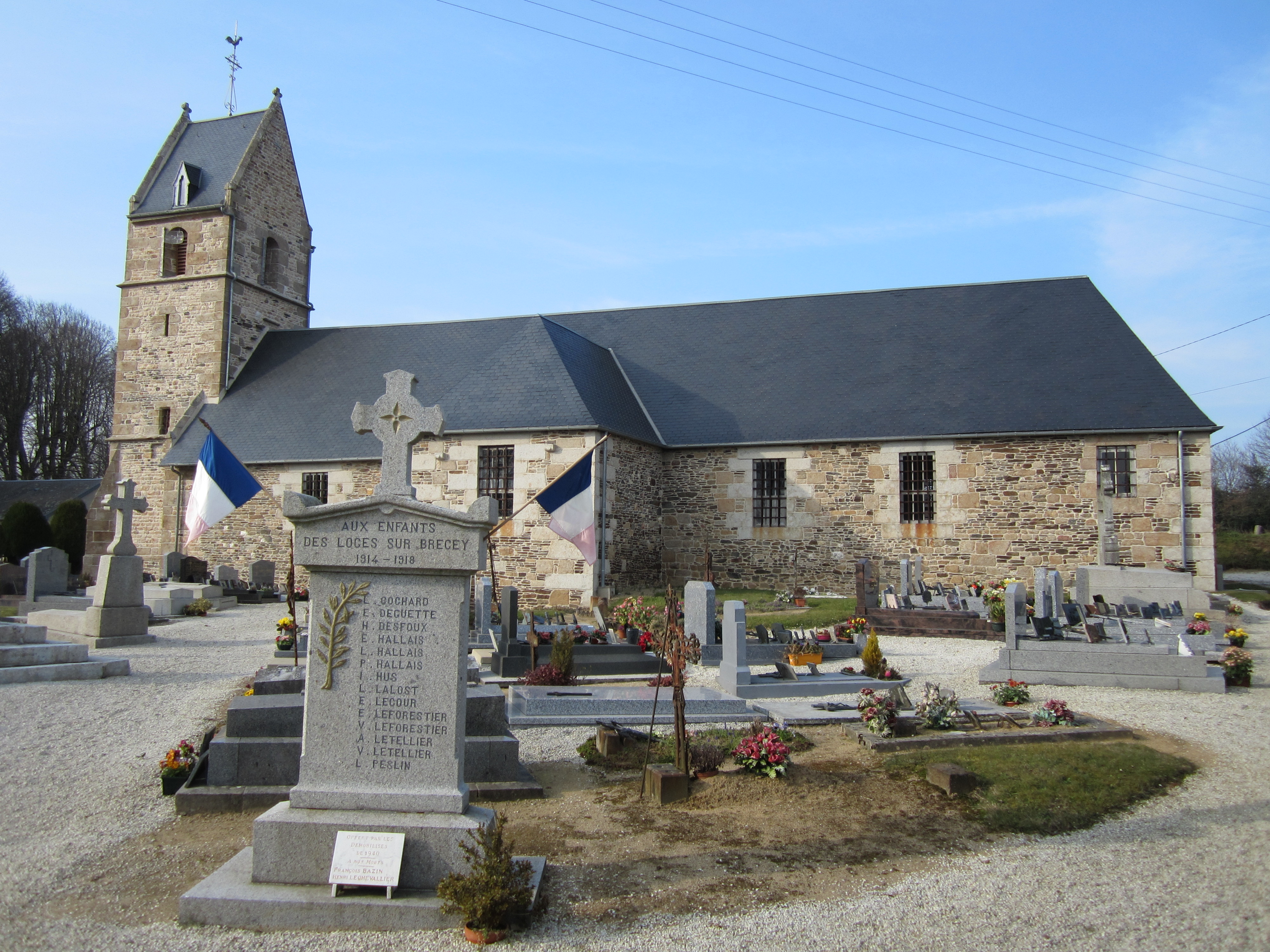 Les Loges-sur-Brécey, Manche